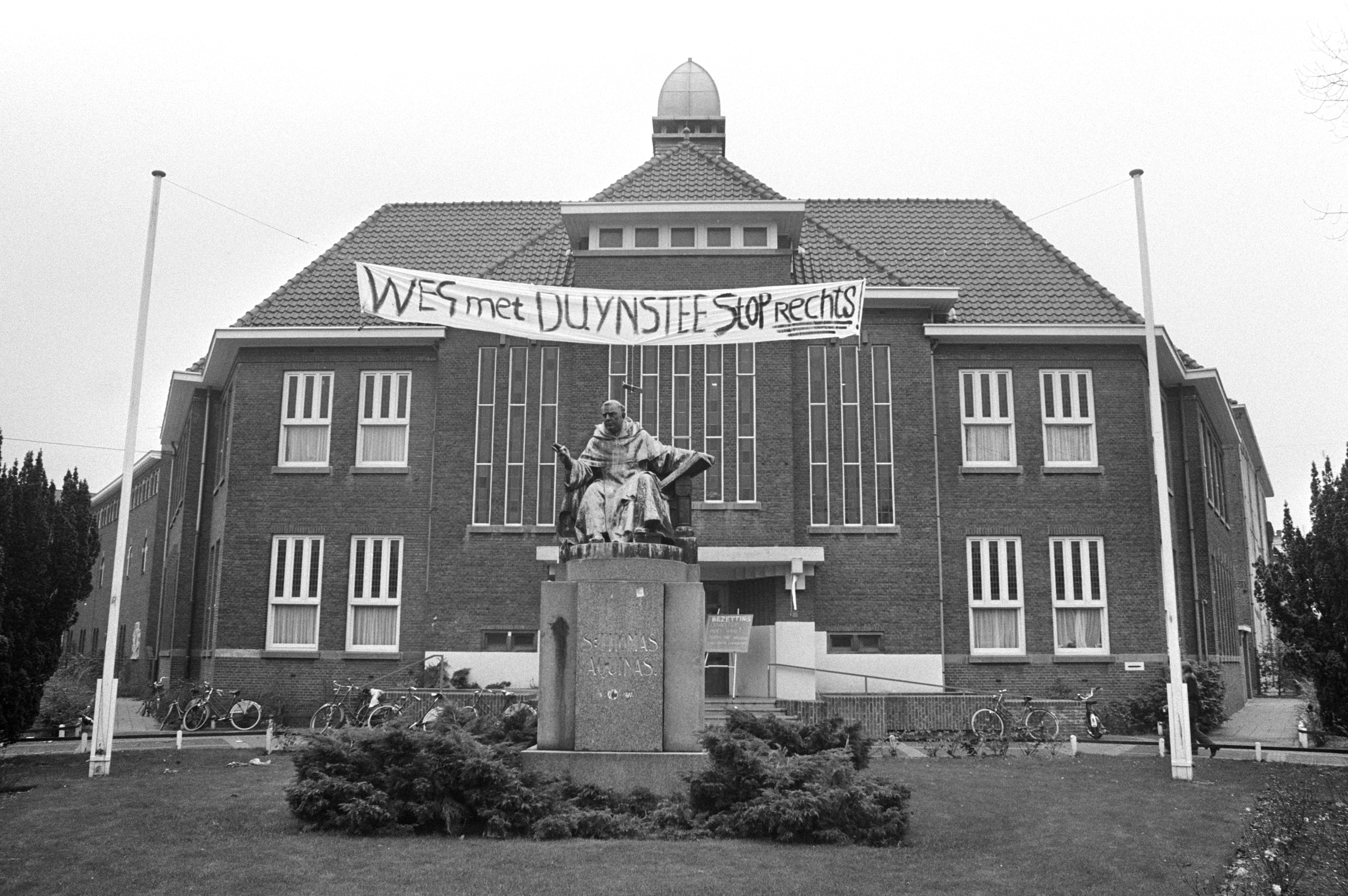 Collectie / Archief : Fotocollectie Anefo Reportage / Serie : [ onbekend ] Beschrijving : Studenten bezetten aula Universiteit in Nijmegen, spandoek Weg met Duynstee boven beeld van Thomas van Aquino en bezetters in aula met spandoeken / Datum : 31 oktober 1972 Locatie : Nijmegen Trefwoorden : SPANDOEKEN, STUDENTEN, aulas, beelden, universiteiten Fotograaf : Verhoeff, Bert / Anefo Auteursrechthebbende : Nationaal Archief Materiaalsoort : Negatief (zwart/wit) Nummer archiefinventaris : bekijk toegang 2.24.01.05 Bestanddeelnummer : 925-9886